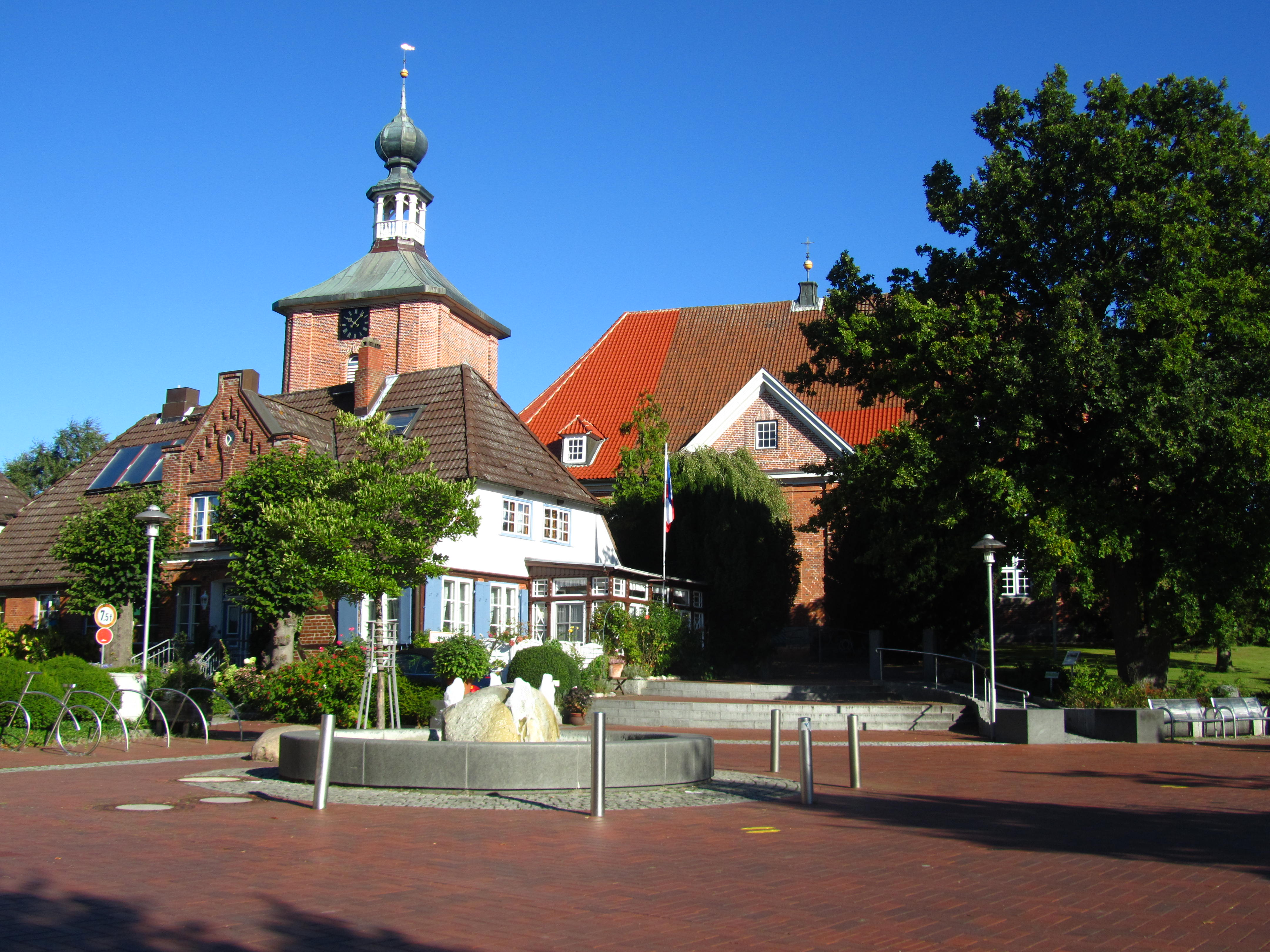 Marktplatz von Schönberg (Holstein). Im Hintergrund ist die ev.-luth. Kirche zu sehen.